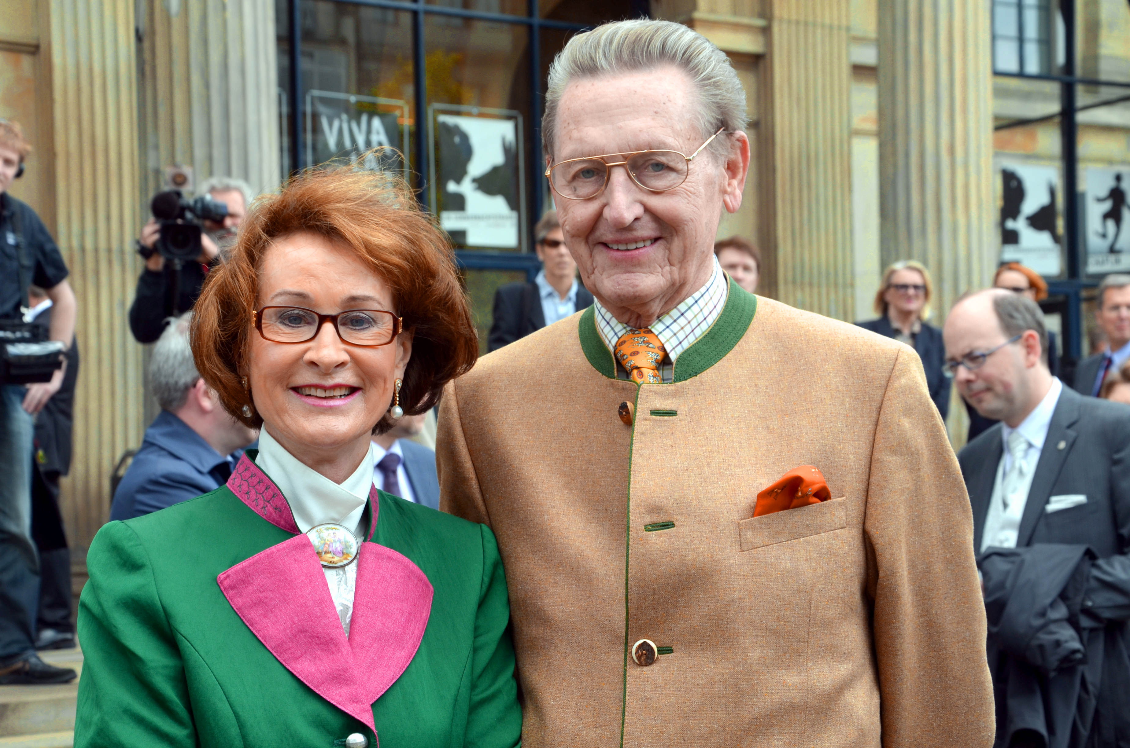 Zur Festveranstaltung im Opernhaus in Hannover anlässlich der Eröffnung der Niedersächsischen Landesausstellung 2014 unter dem Titel Als die Royals aus Hannover kamen erschienen auch der ehemalige Landesminister Prof. Johann-Tönjes Cassens mit Ehefrau Sigrid ...